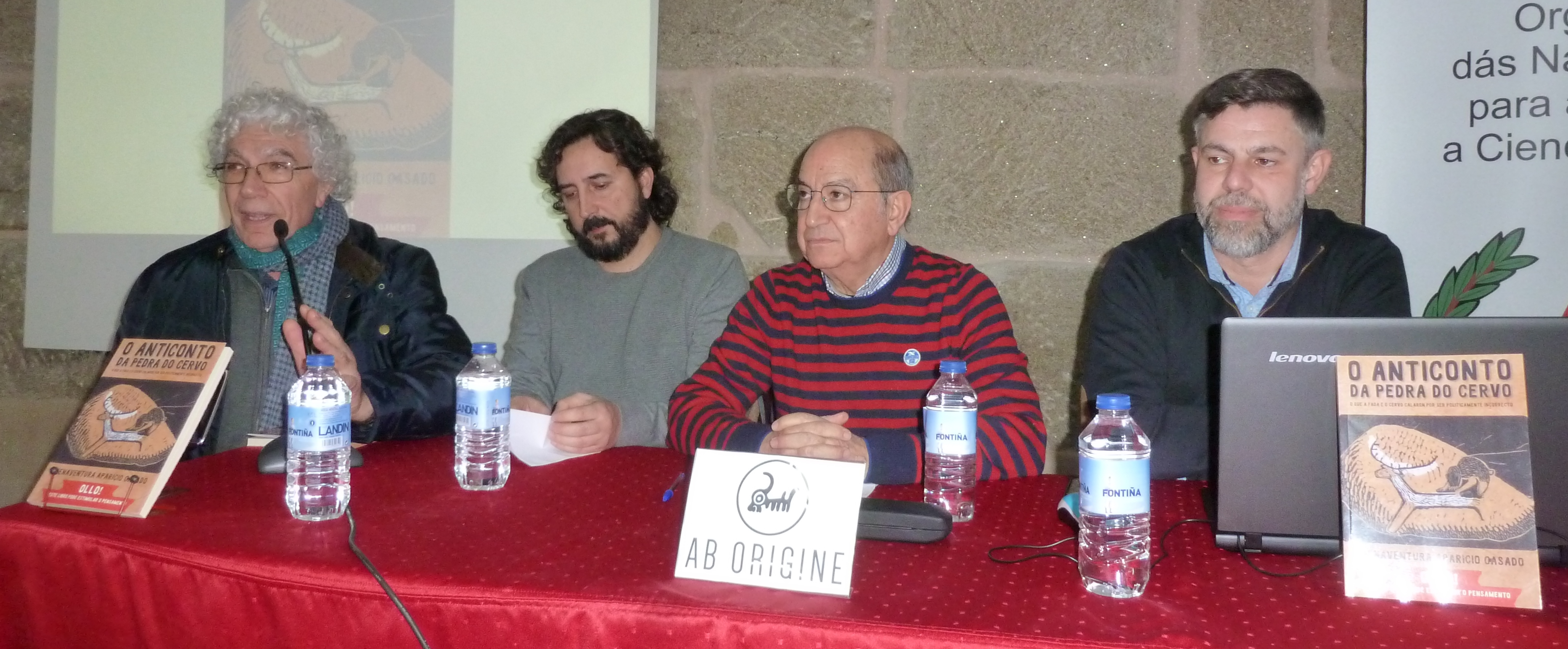 Presentación de "O anticonto da pedra do cervo" no Ateneo Santa Cecila de Marín o 25/01/2019. De esquerda a dereita: Lois González Dopazo, Rafael Quintía, Buenaventura Aparicio (autor) e Valentín G. Bóveda (neto de Alexandre Bóveda)